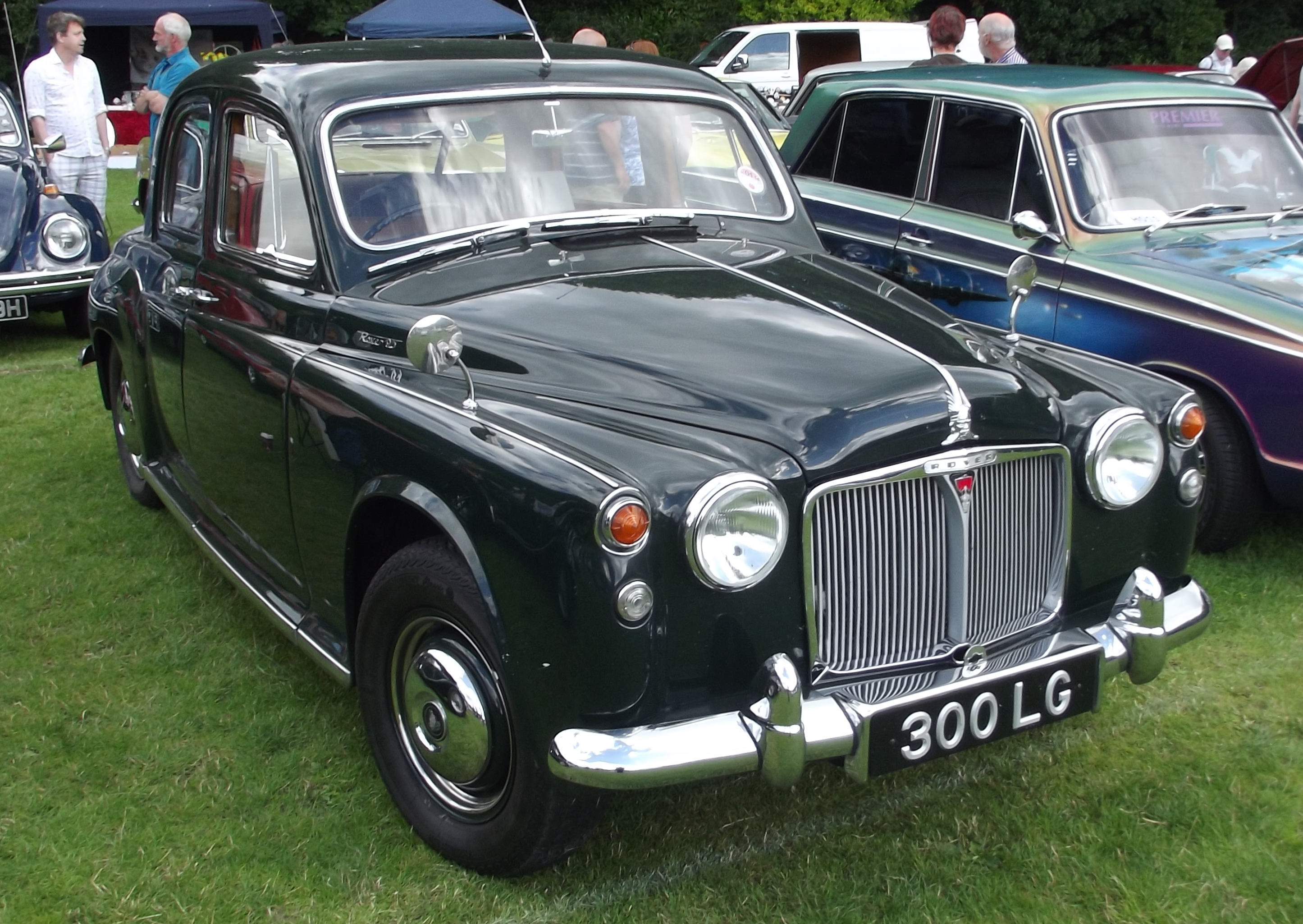 1963 Rover 95 saloon (DVLA) first registered 8 April 1963, 2625 cc Hebden Bridge Vintage Weekend 2013